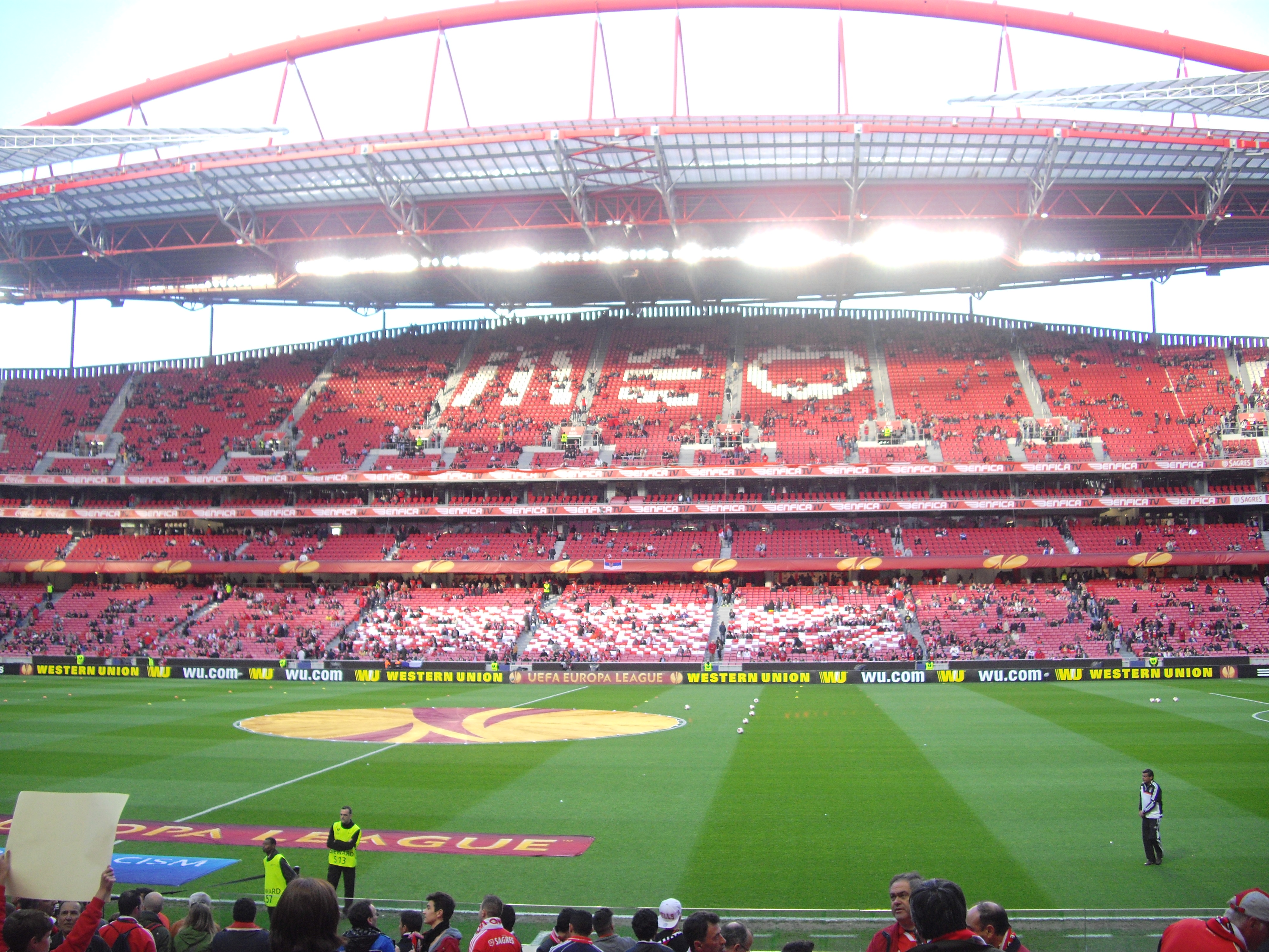 Europa League, Portugal